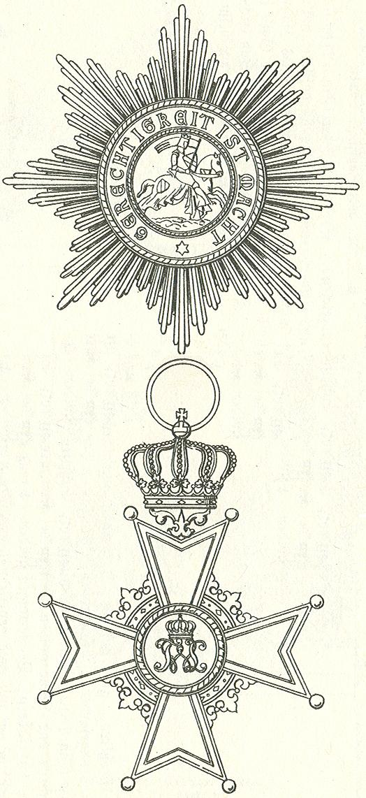 Eigen bewerking van een afbeelding uit 1893